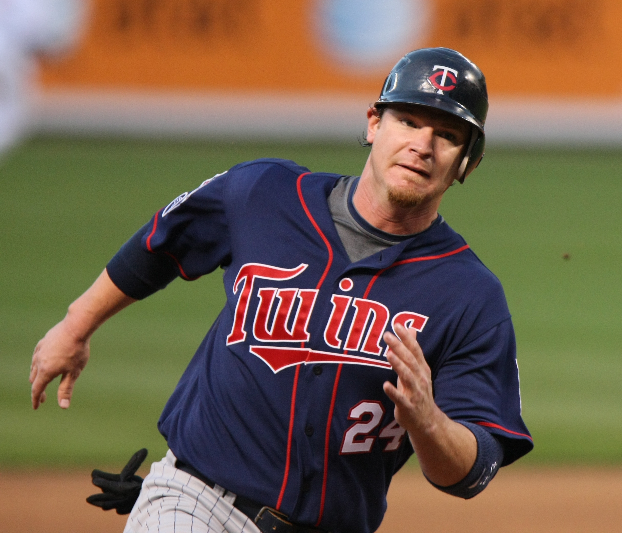 Joe Crede